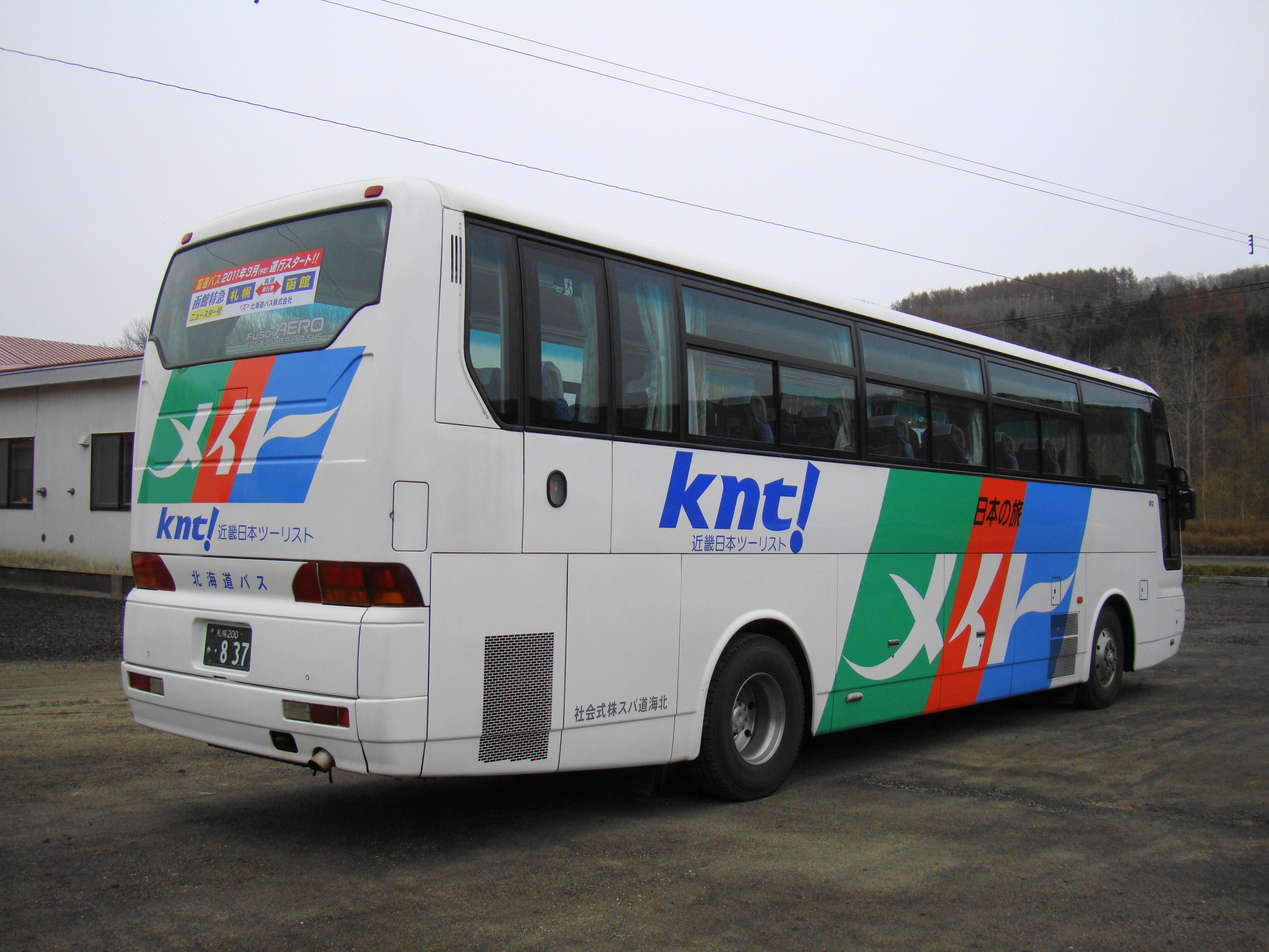 Kinki Nippon Tourist